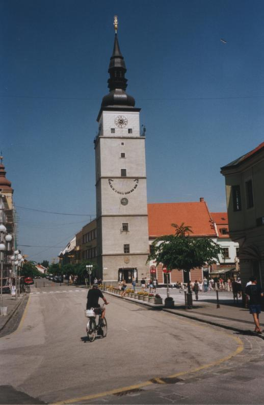 Trnava, mestni stolp na vogalu Trga sv. trojice (Trojičné námestie) Sliko sem posnel lastnoročno.